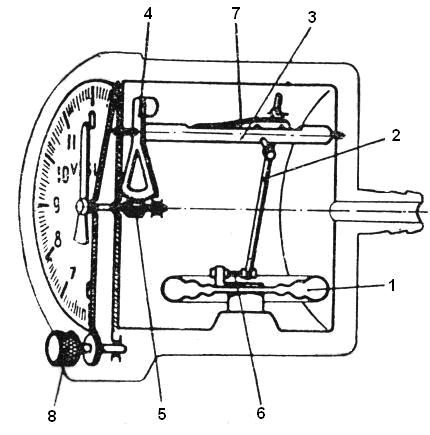 Shema visinomjera